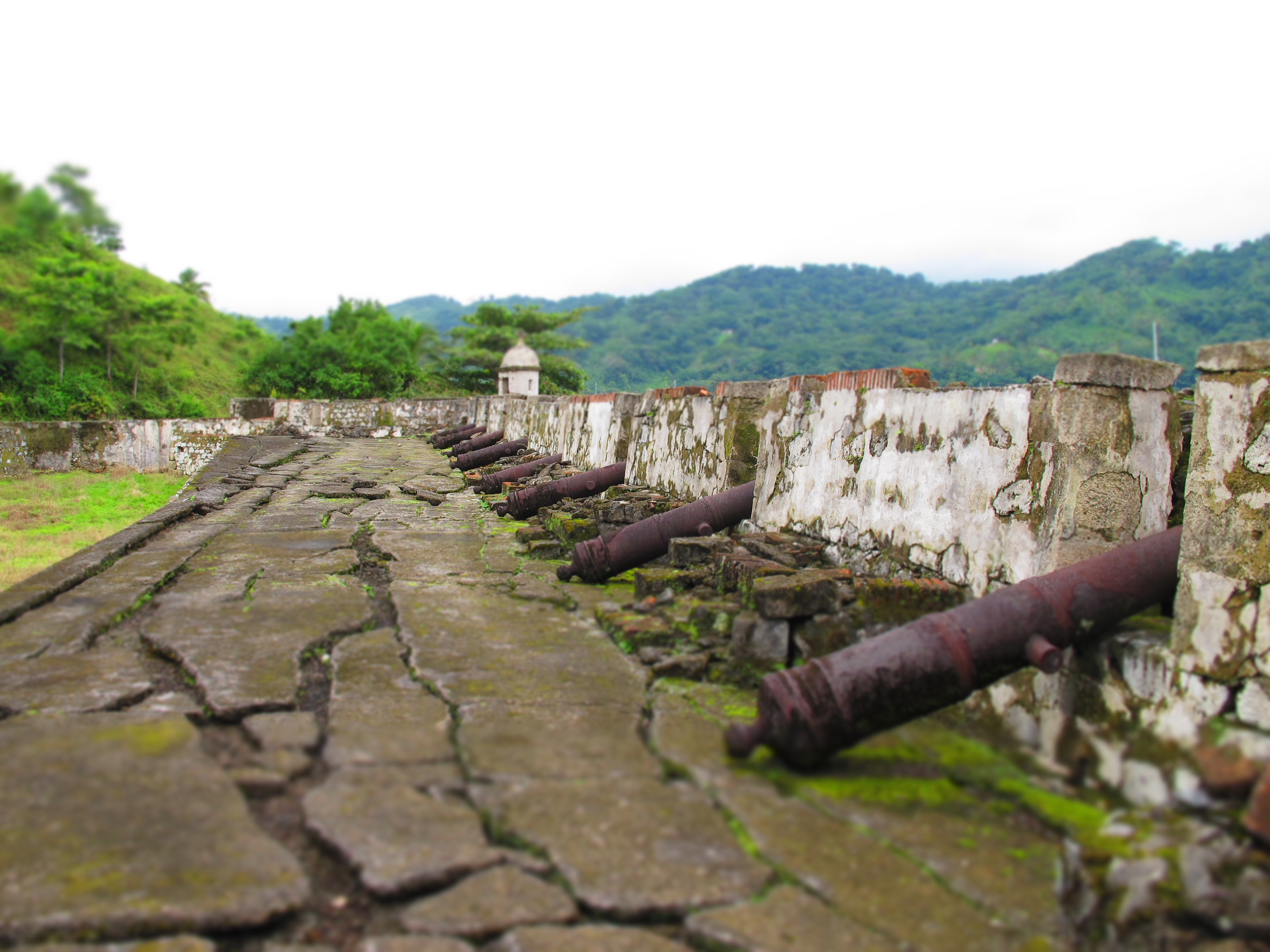 Batería baja de San Fernando